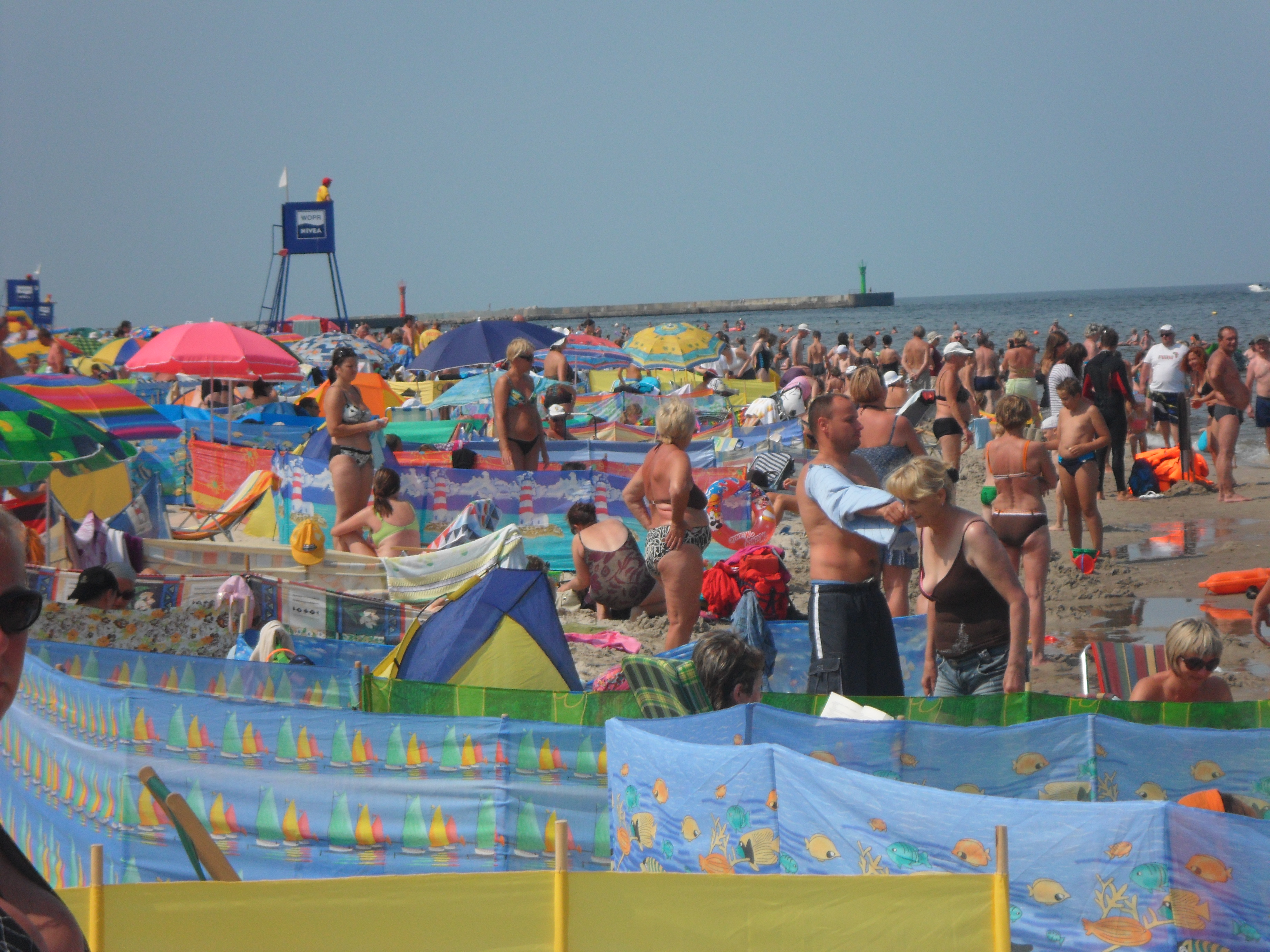 Mrzeżyno Polska